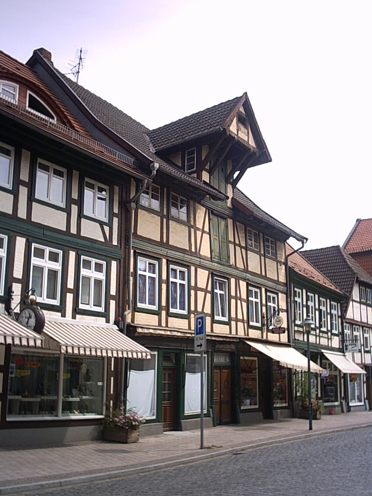 Grabower Altstadt